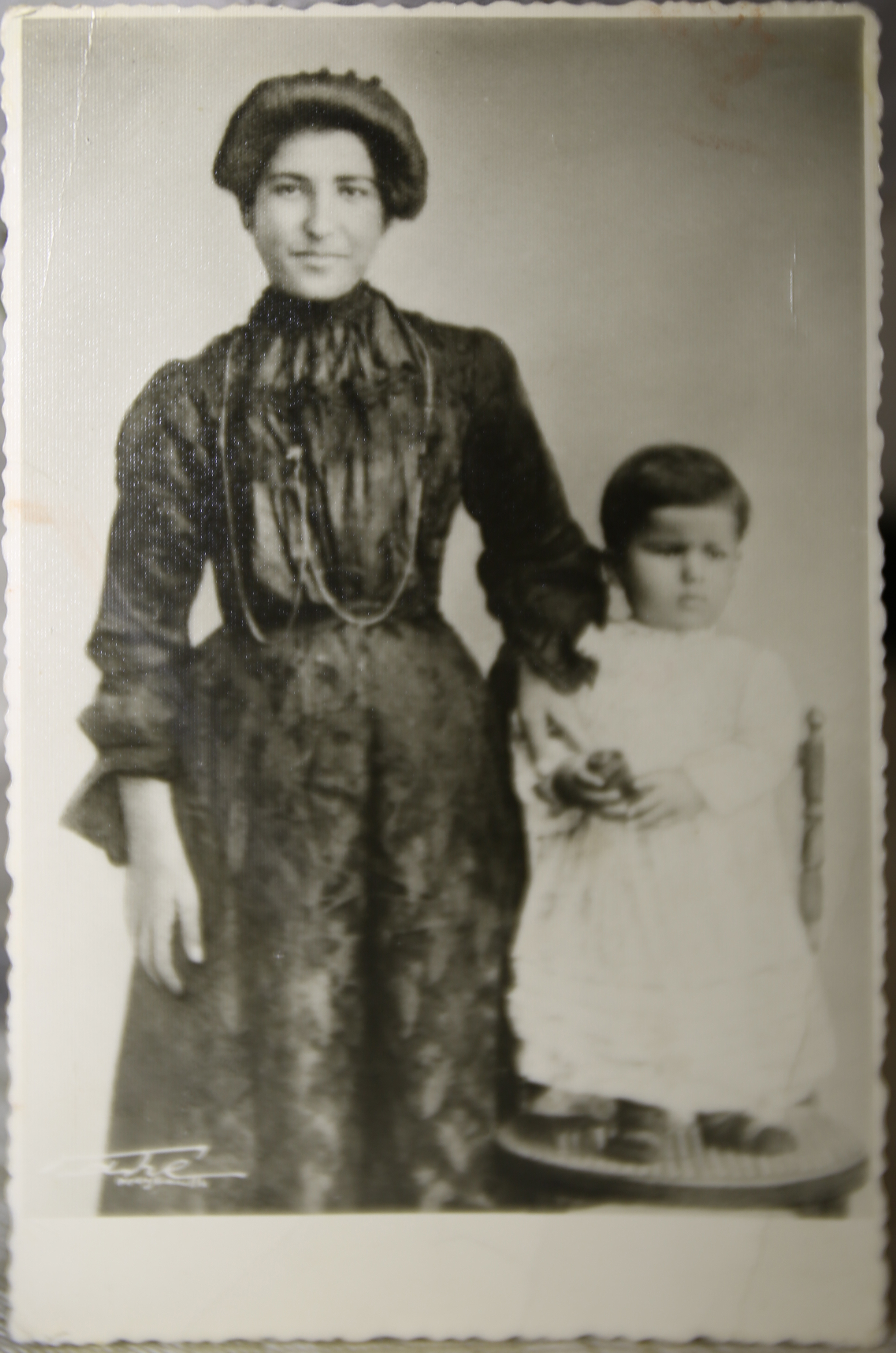 Avec sa mere dans son enfance